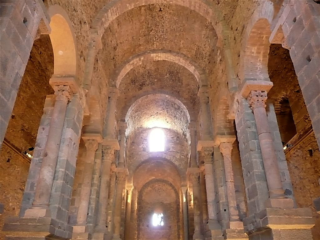 Monestir de Sant Pere de Rodes (el Port de la Selva, Alt Empordà, Catalunya). Volta de la nau central de l'església (vers l'absis).